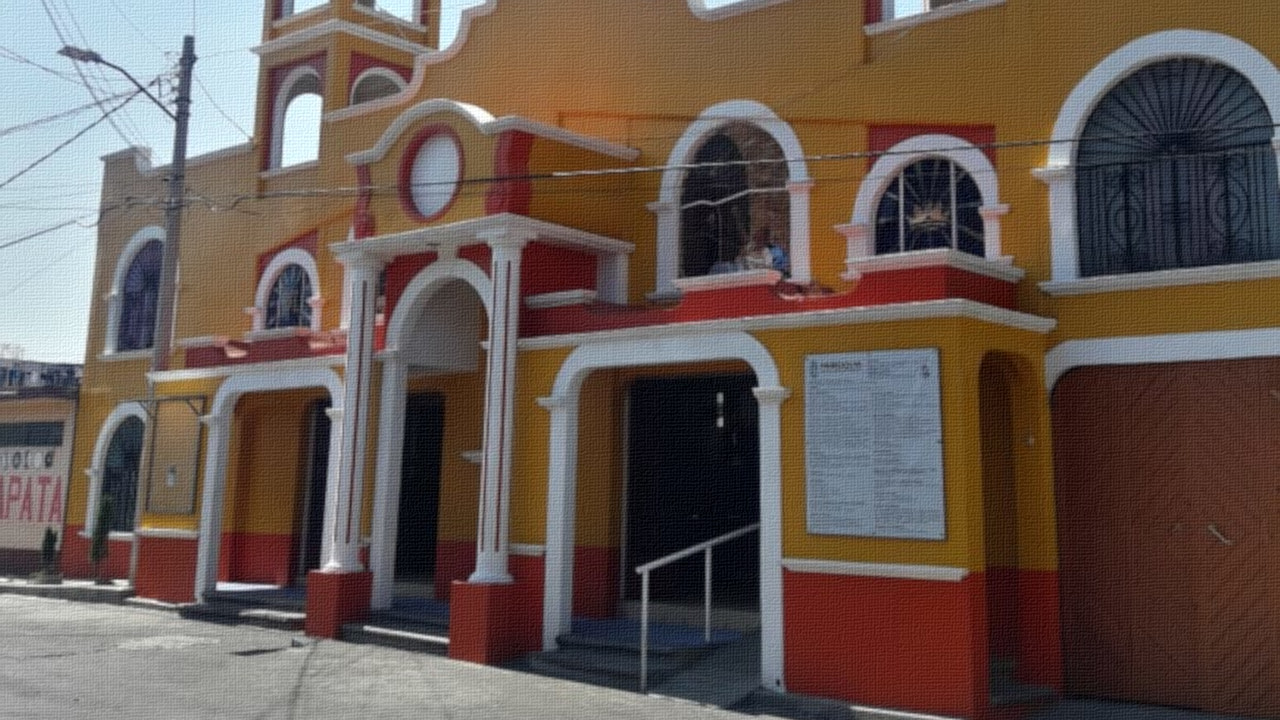 Templo Nuestra Señora de Guadalupe, Colonia Emiliano Zapata, Municipio de la Paz, Estado de México